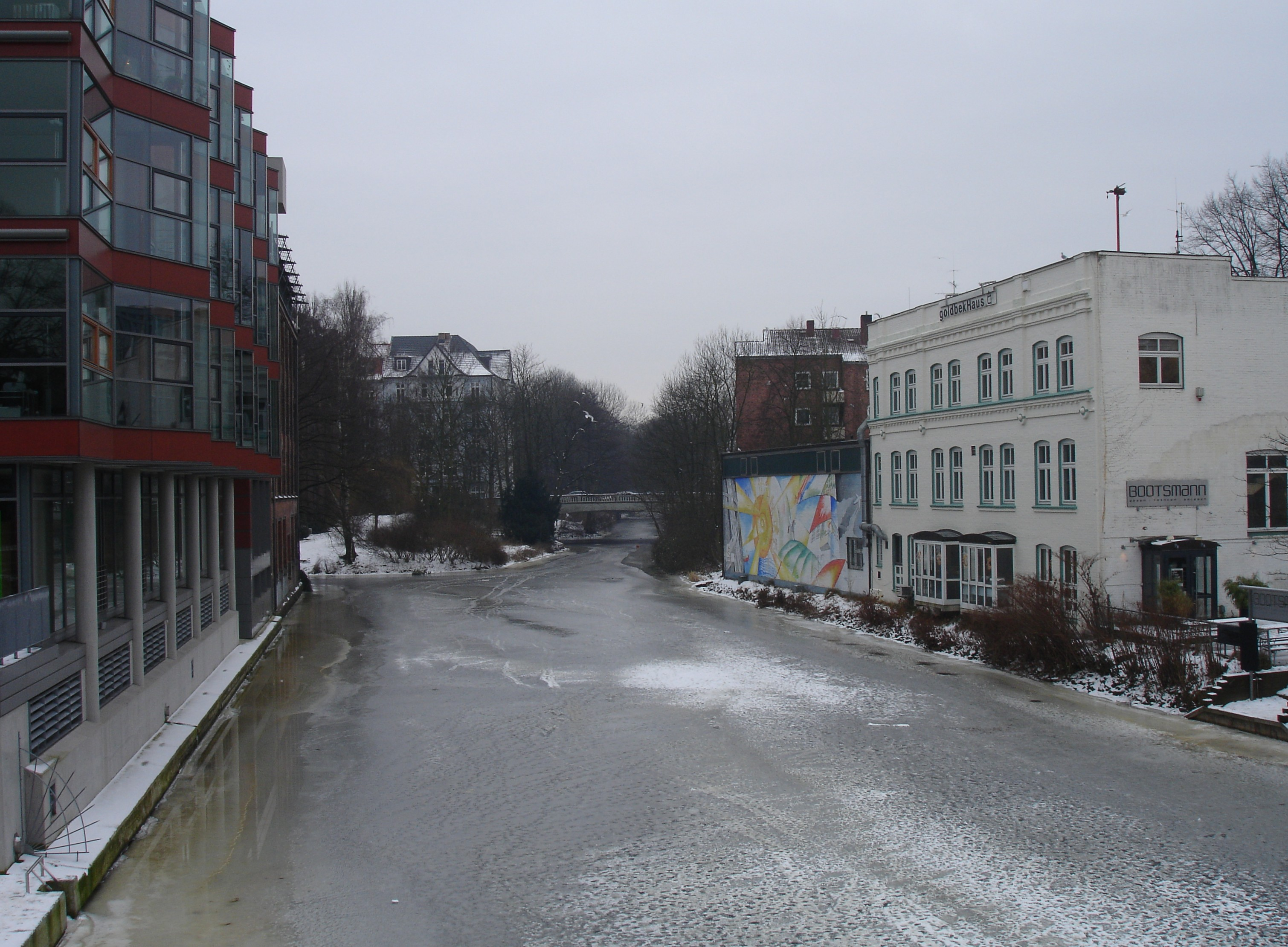 Goldbekkanal im Winter *Quelle: selbst fotografiert. Fotografiert von der Moorfurthbrücke in Richtung Süden. Hinten ist die Brücke im Zuge der Dorotheenstraße zu sehen. Vorher geht nach links der Mühlenkampkanal ab.